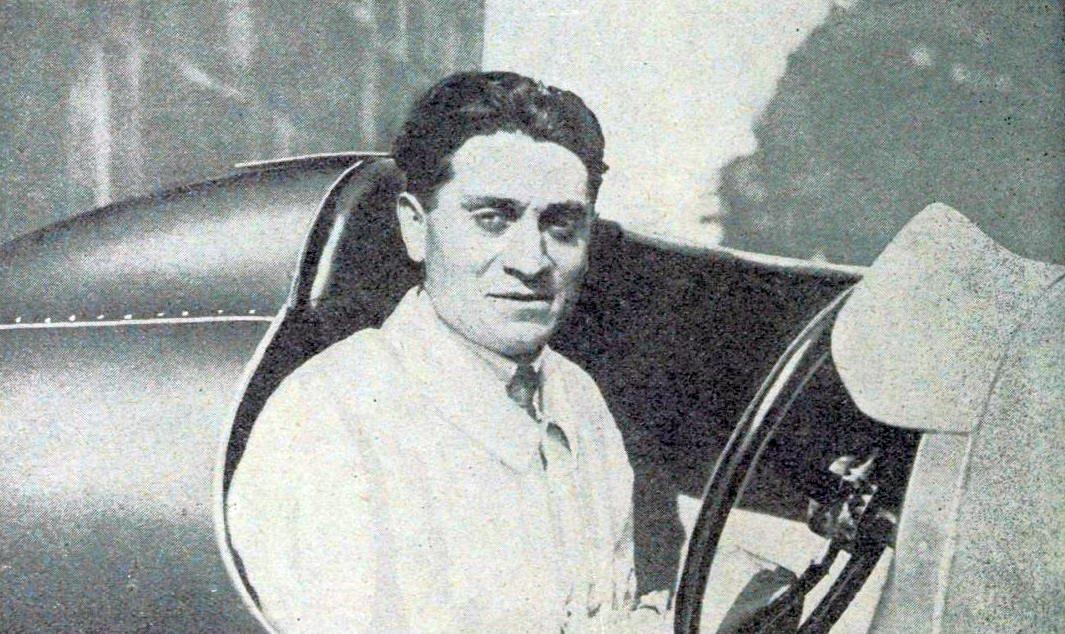 Pierre Goutte, pilote officiel Salmson, vainqueur des 200 milles de Brookland (Junior Car Club 200 mile race) voiturettes 1.1L en septembre 1925 (après le Grand Prix du M.C.F. en 1924).